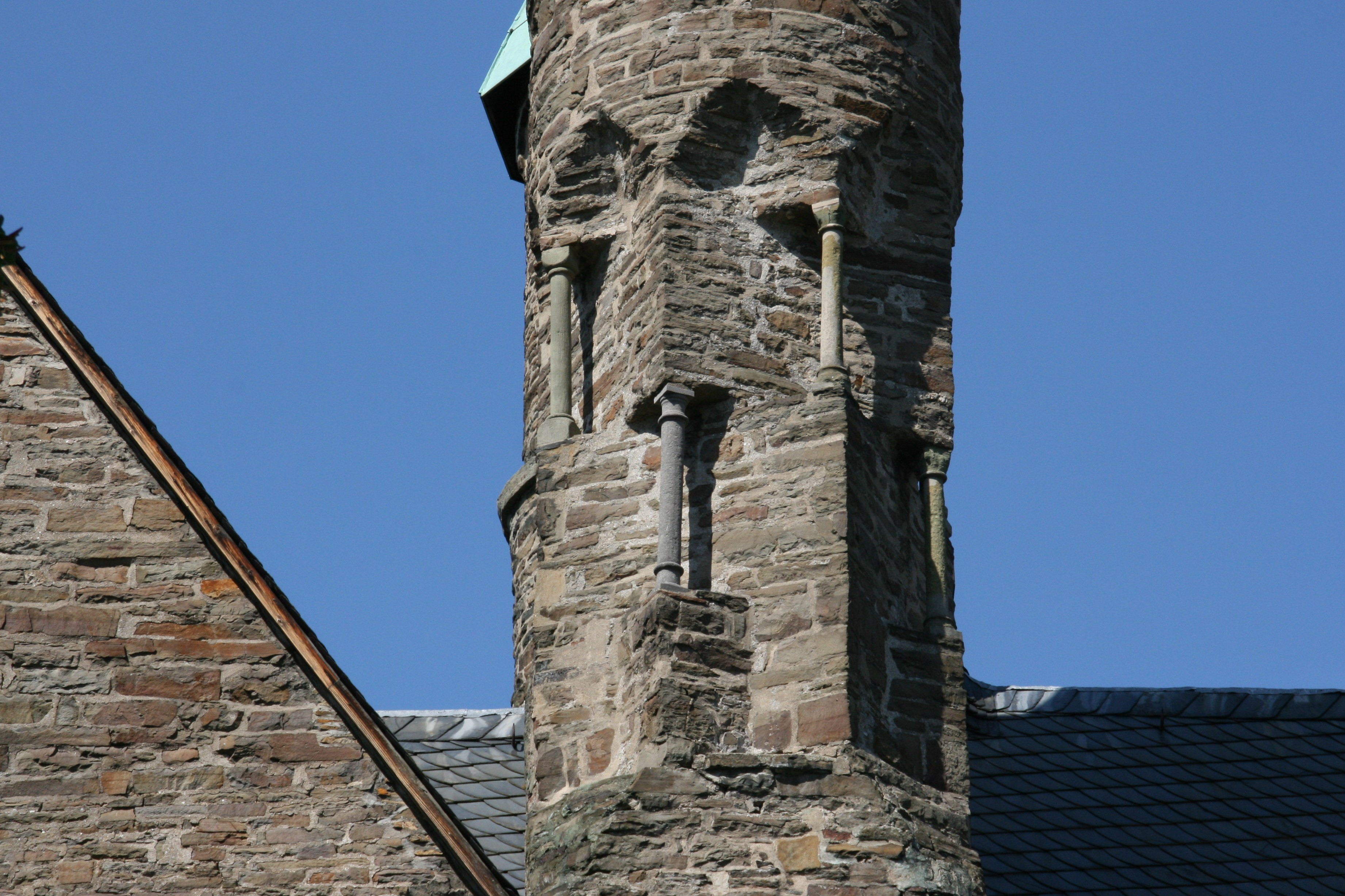 Gemauerte Stützsäulen an einer von zwei Chortürmen der Christuskirche in Plettenberg